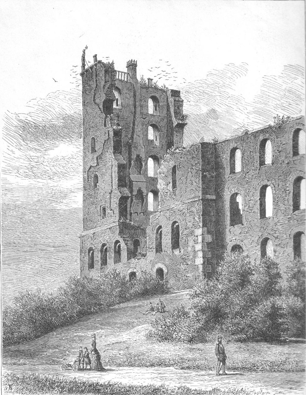 Parti af Koldinghus Ruiner. (Kæmpetaarnet og den vestlige Fløjl).